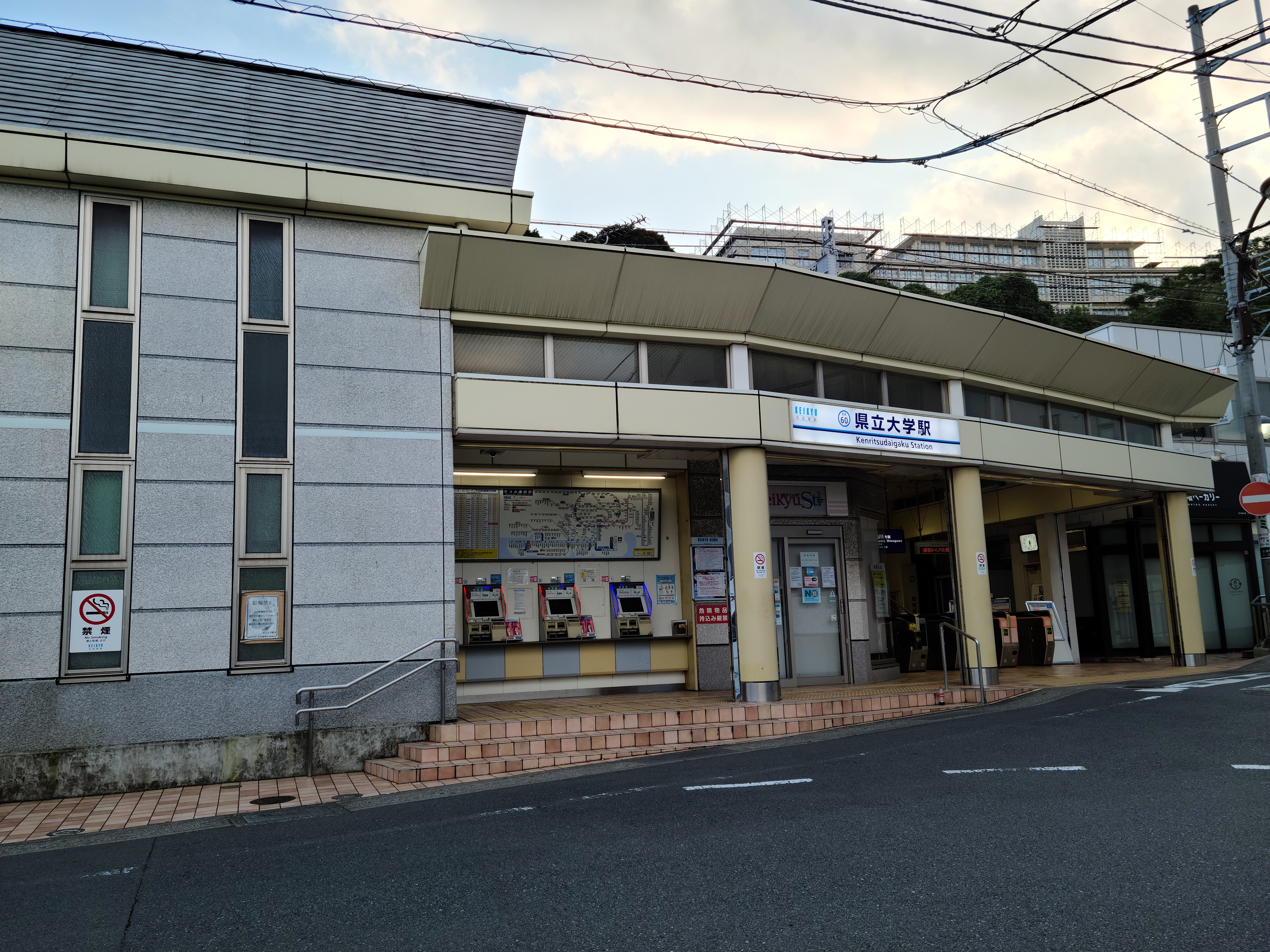 駅舎です。